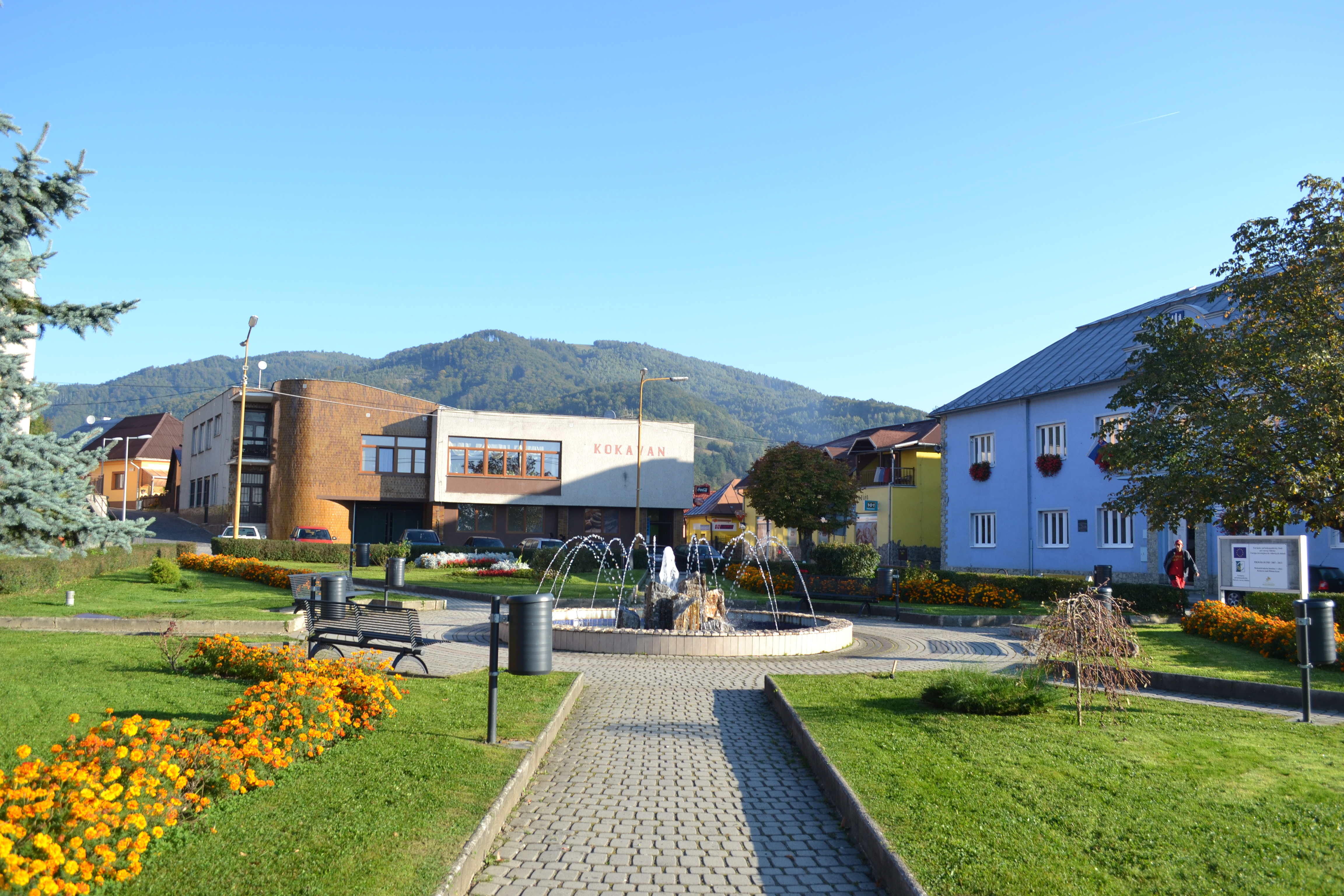 Námestie 1. mája v Kokave nad Rimavicou